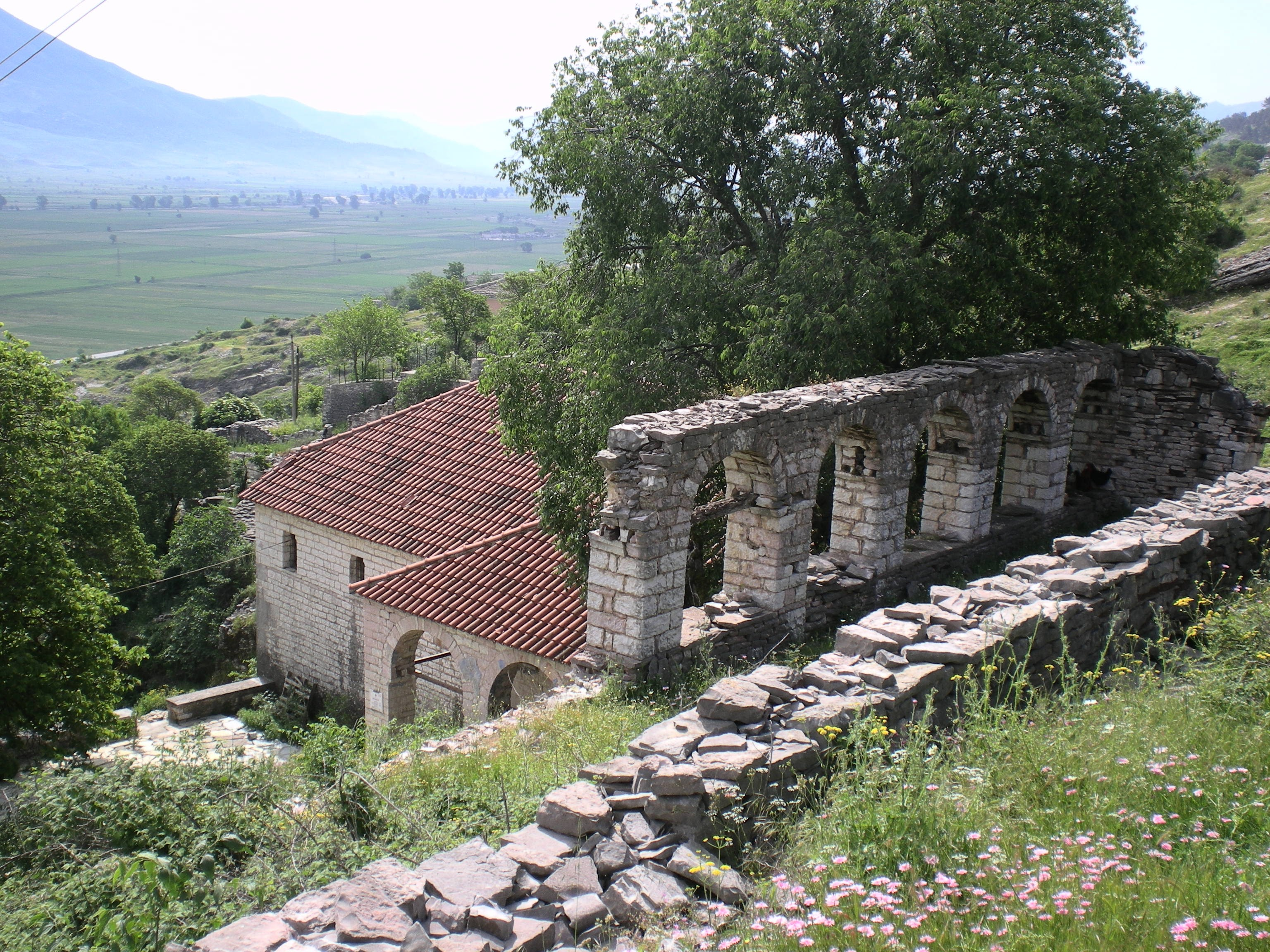 Η εκκλησία από το πάνω μέρος του χωριού, που ήταν το χαγιάτι.